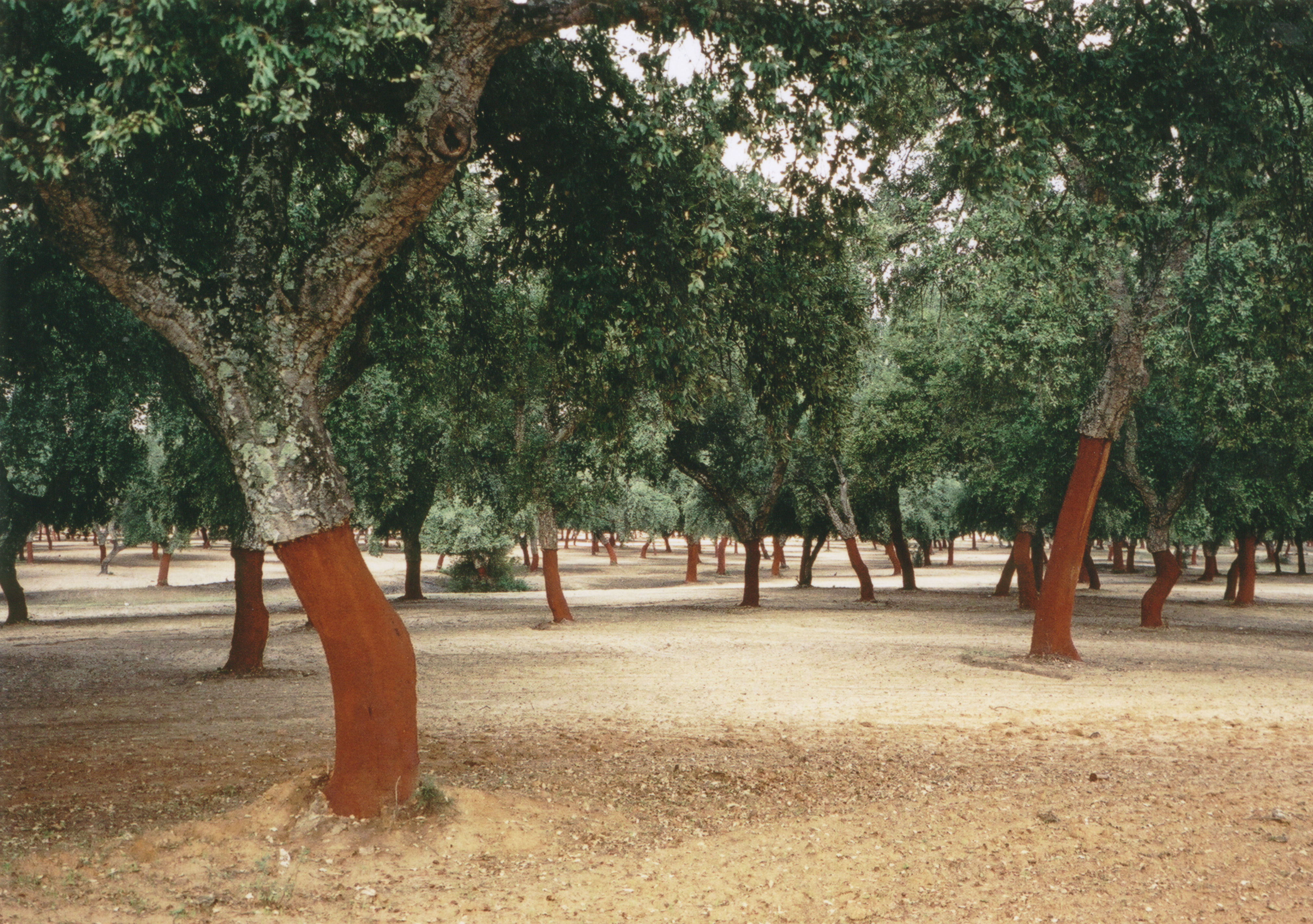 Alcornocal (Quercus suber) adehesado cerca de Arcos de la Frontera, Cádiz, España.